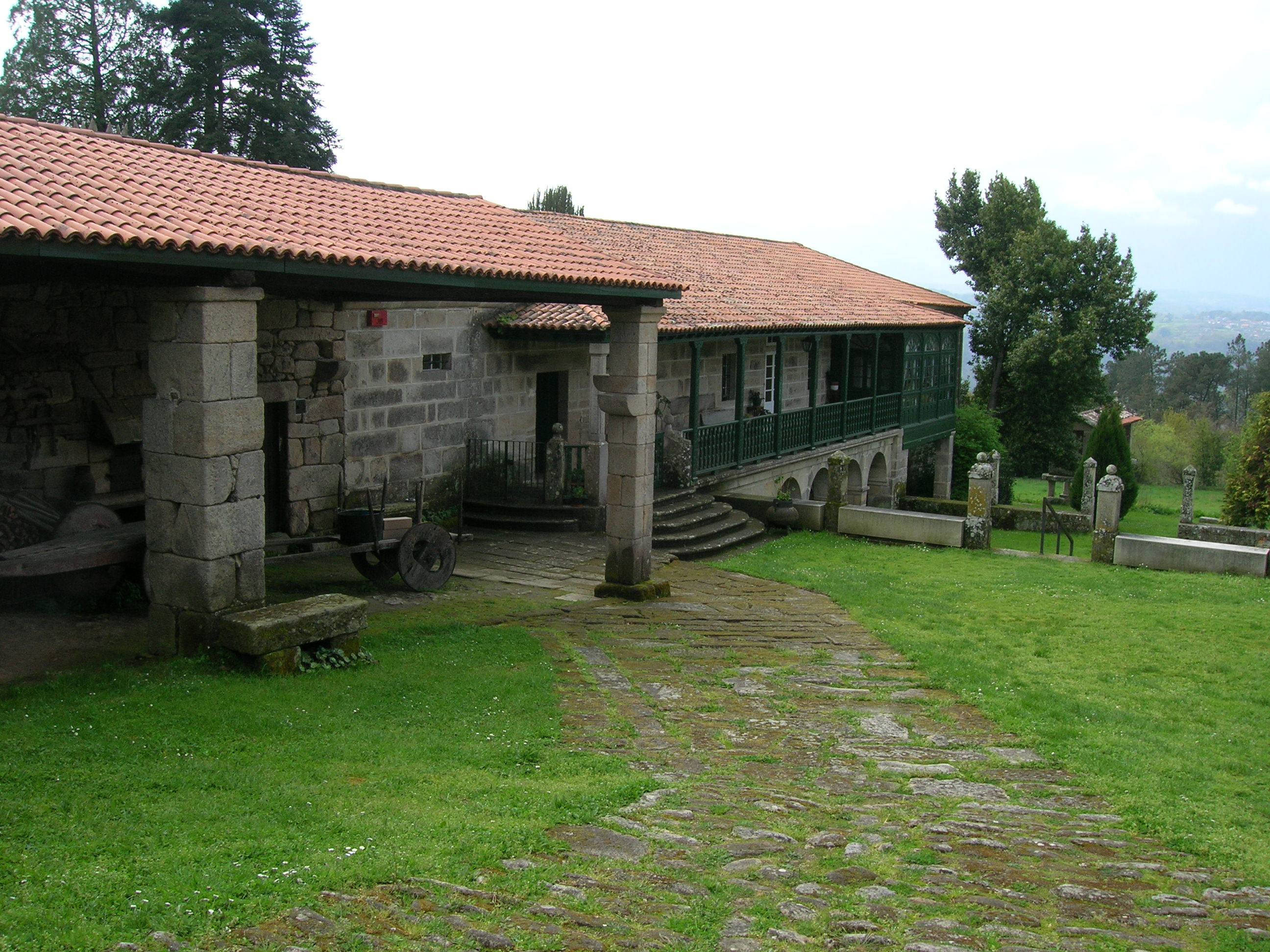 Se encuentra situado en el lugar de Cima de Vila, parroquia de Trasalba. El Pazo se conserva como estaba en vida de Don Ramón, pero en la actualidad ofrece también una serie de servicios para el público. Esta foto participó en el juego En un lugar de Flickr.